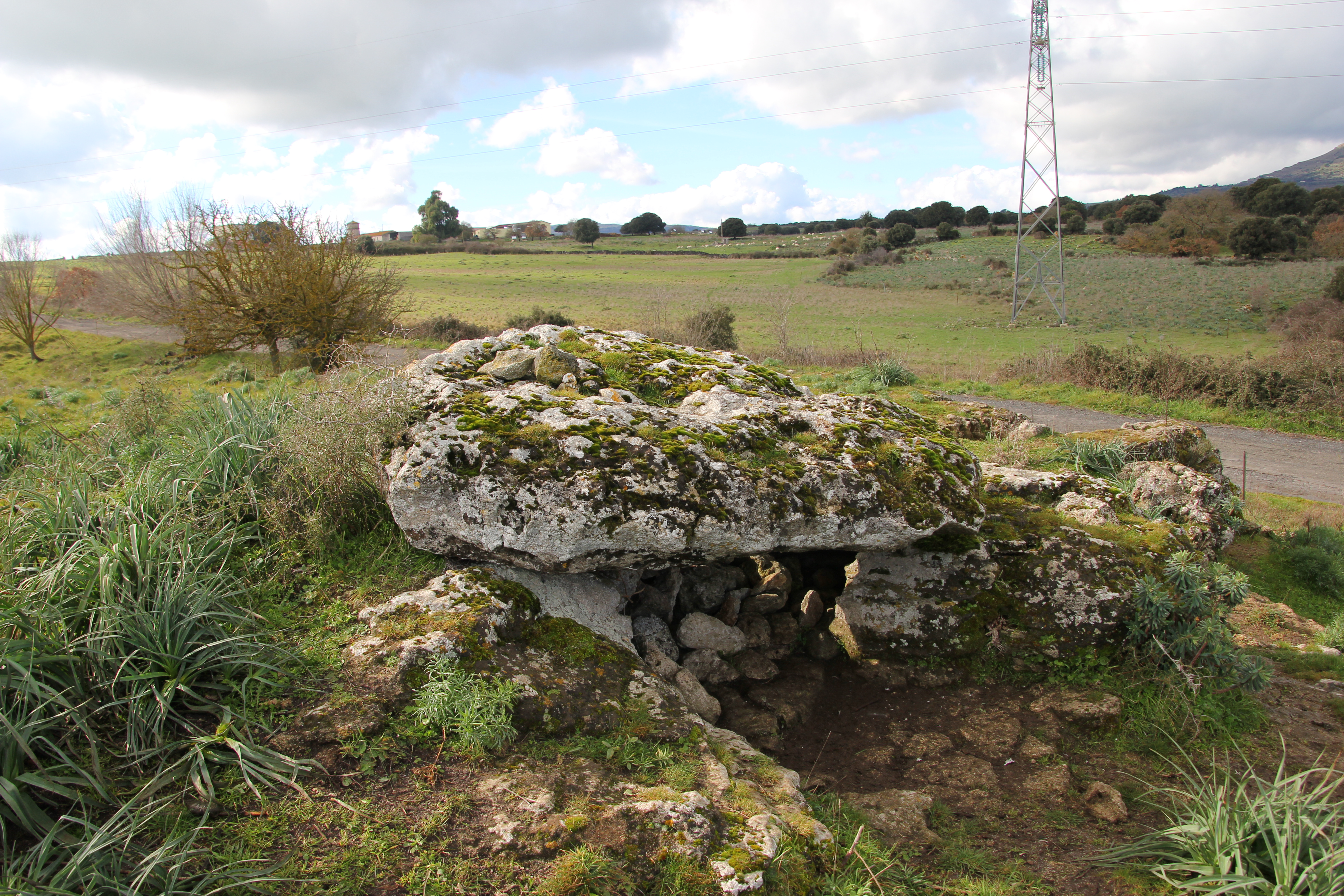 Torralba, dolmen di Prunaiola